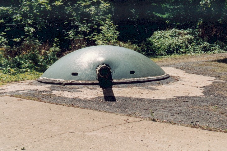 Une des tourelles de la batterie nord du fort de Guentrange